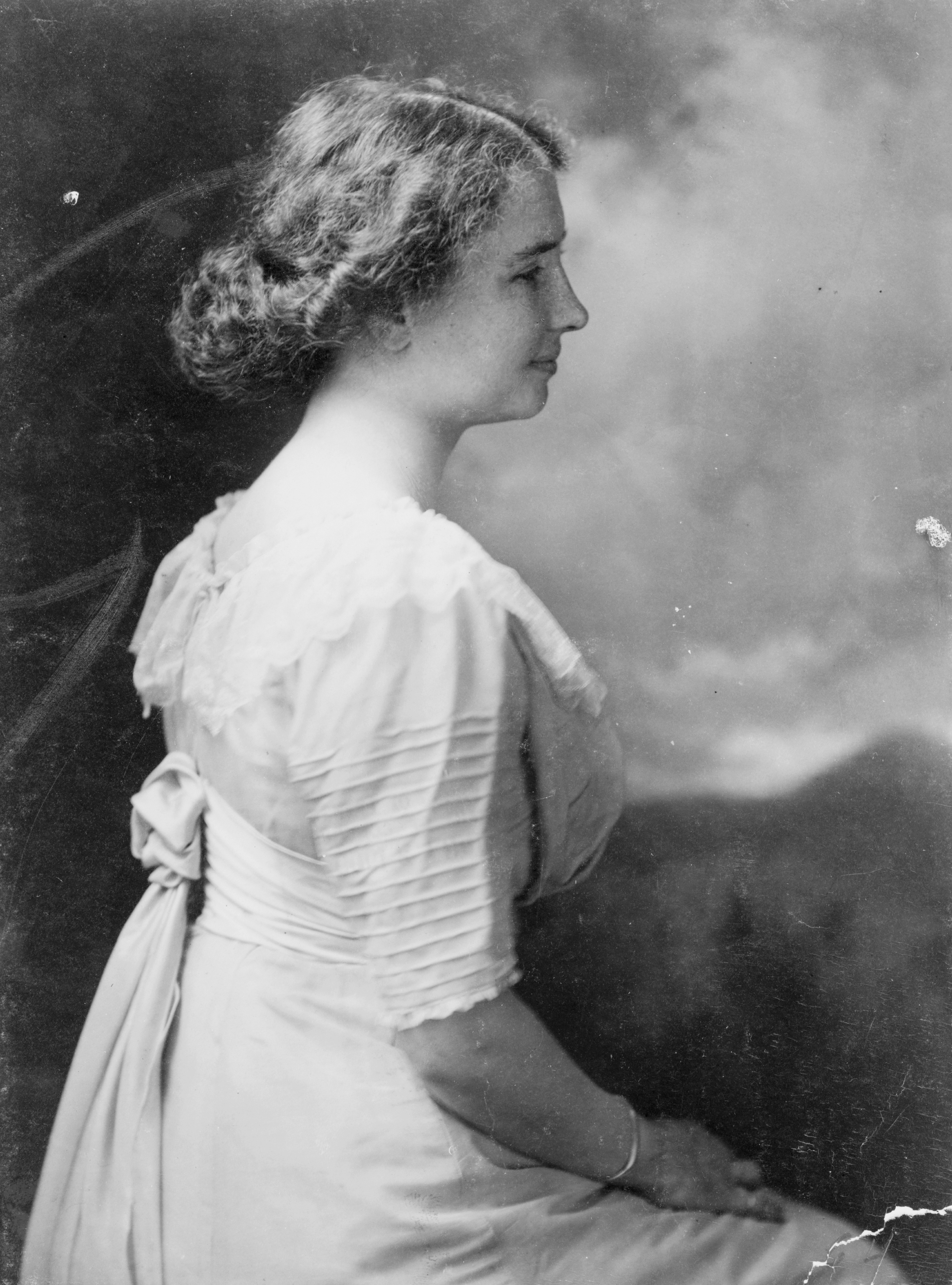 Helen Keller